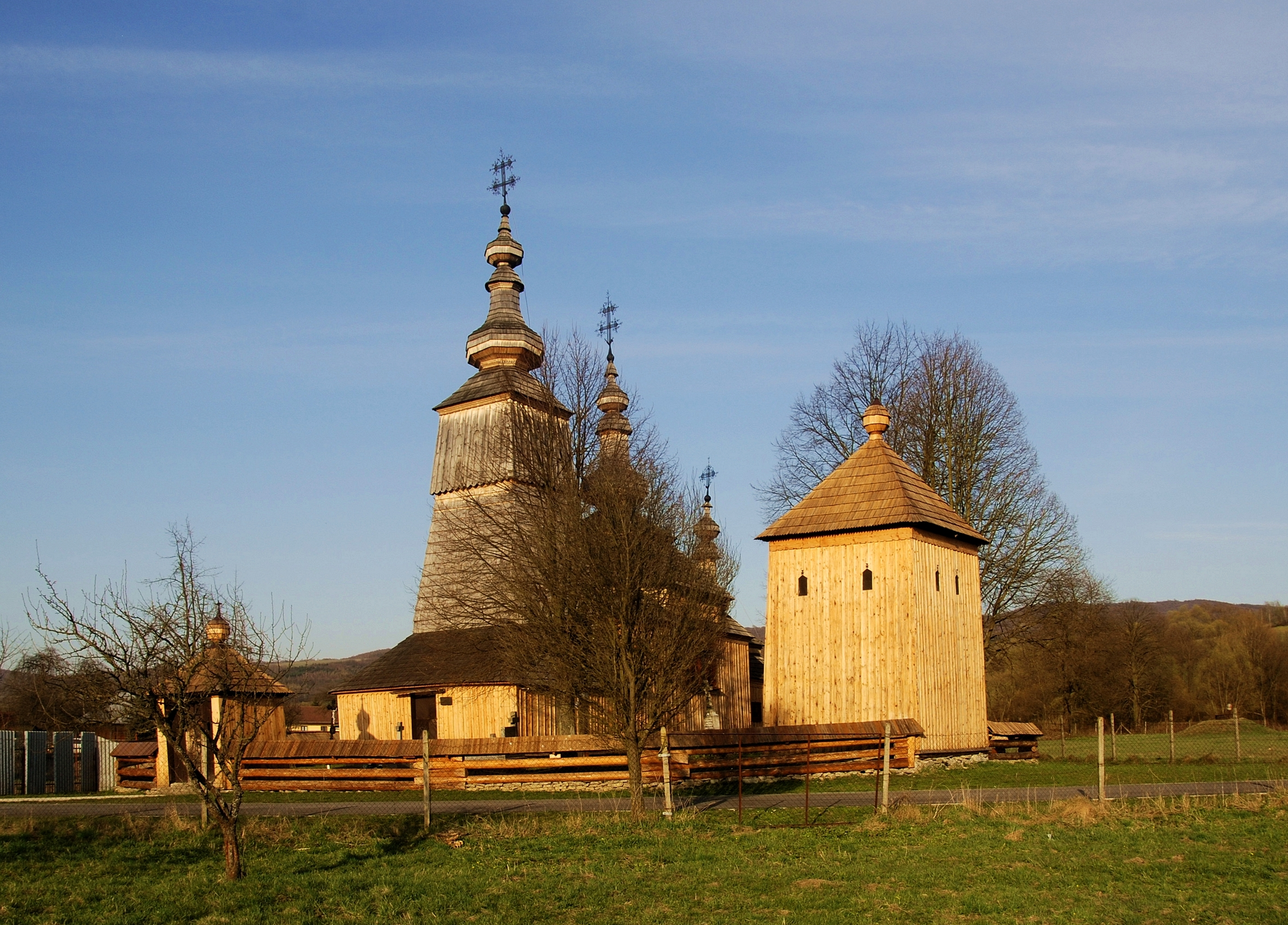 cerkiew